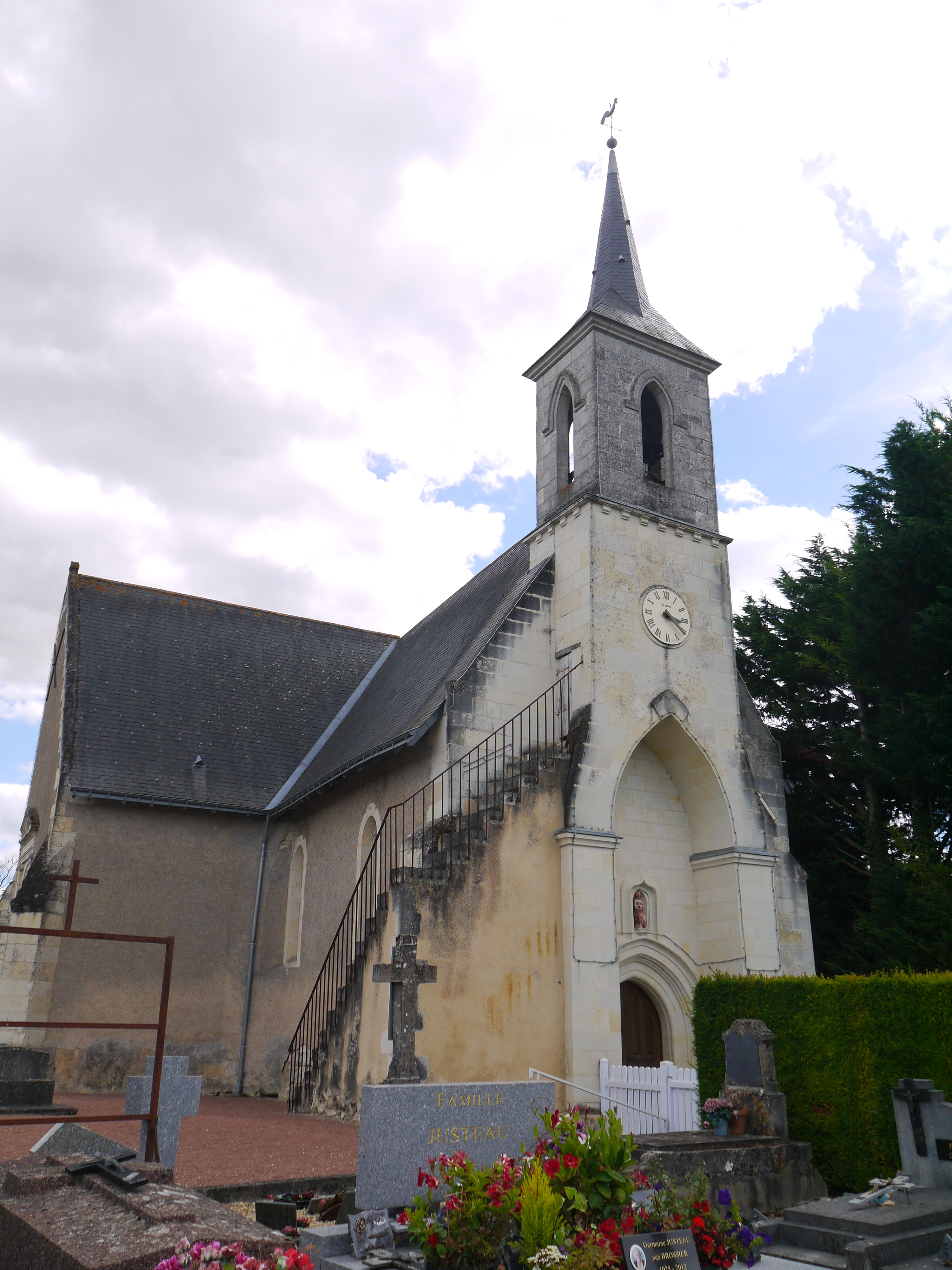 L'église Sainte-Madeleine.